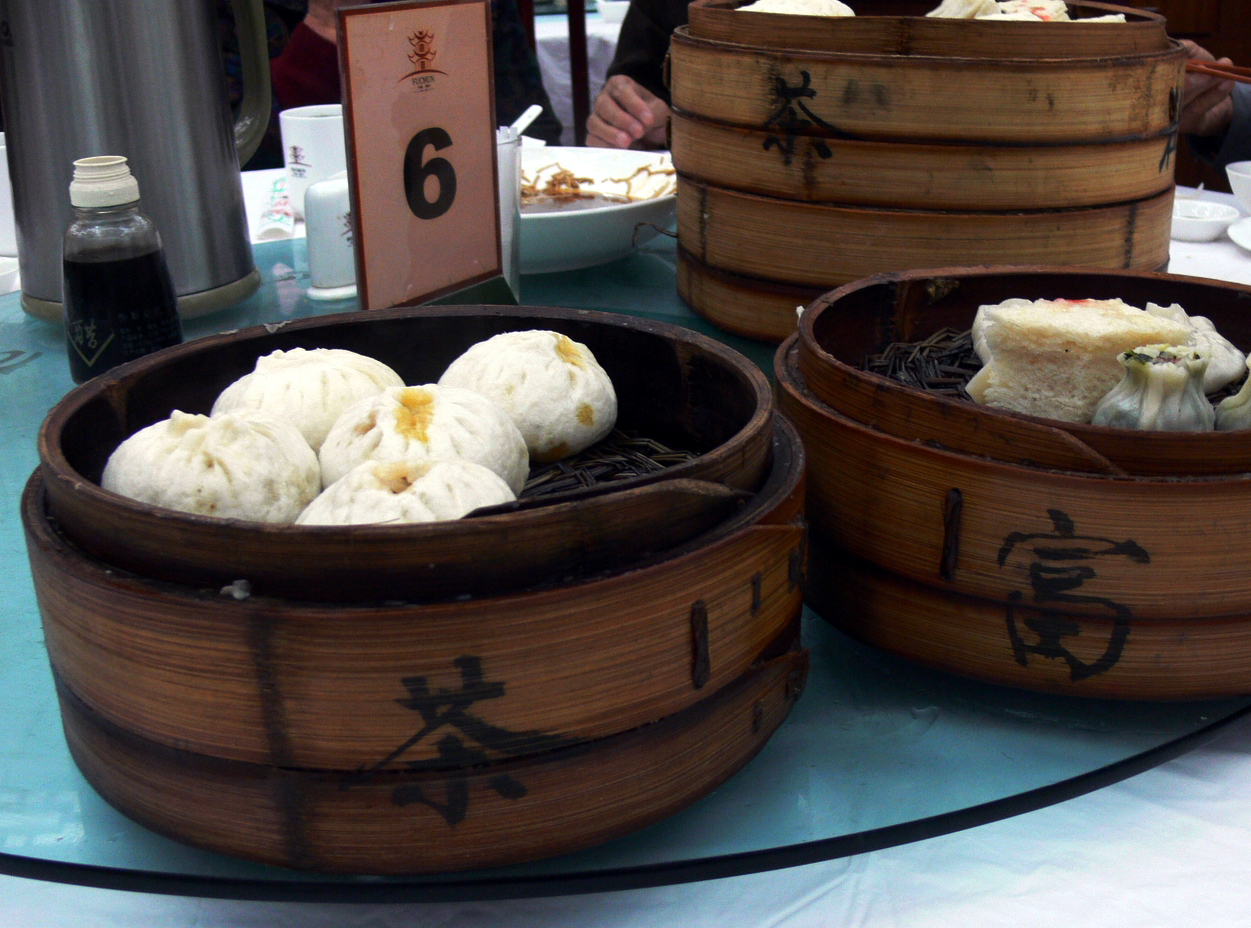 Yangzhou Fu Chun Tea House buns 扬州富春茶社三丁包,千层油糕,翡翠烧卖.